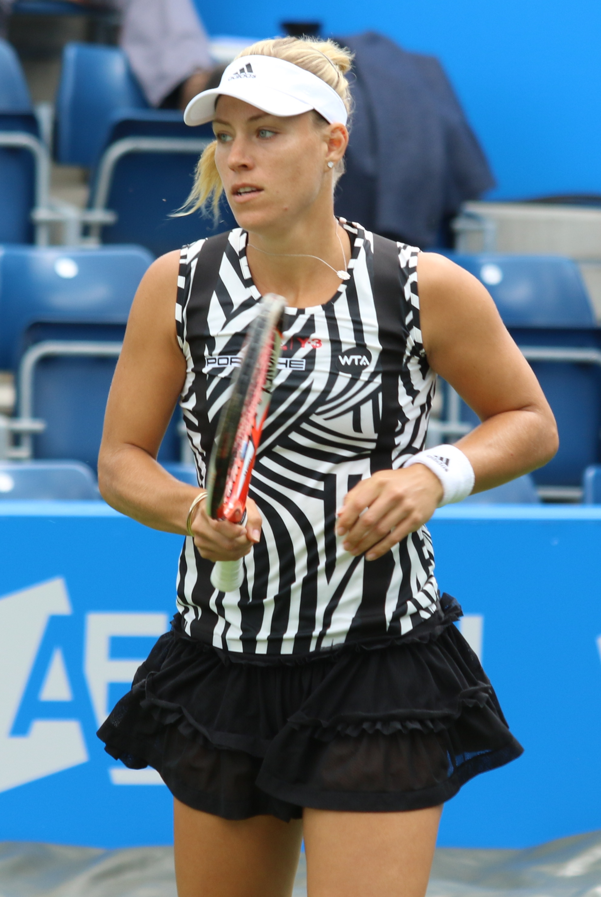 Kerber BM16 (37)